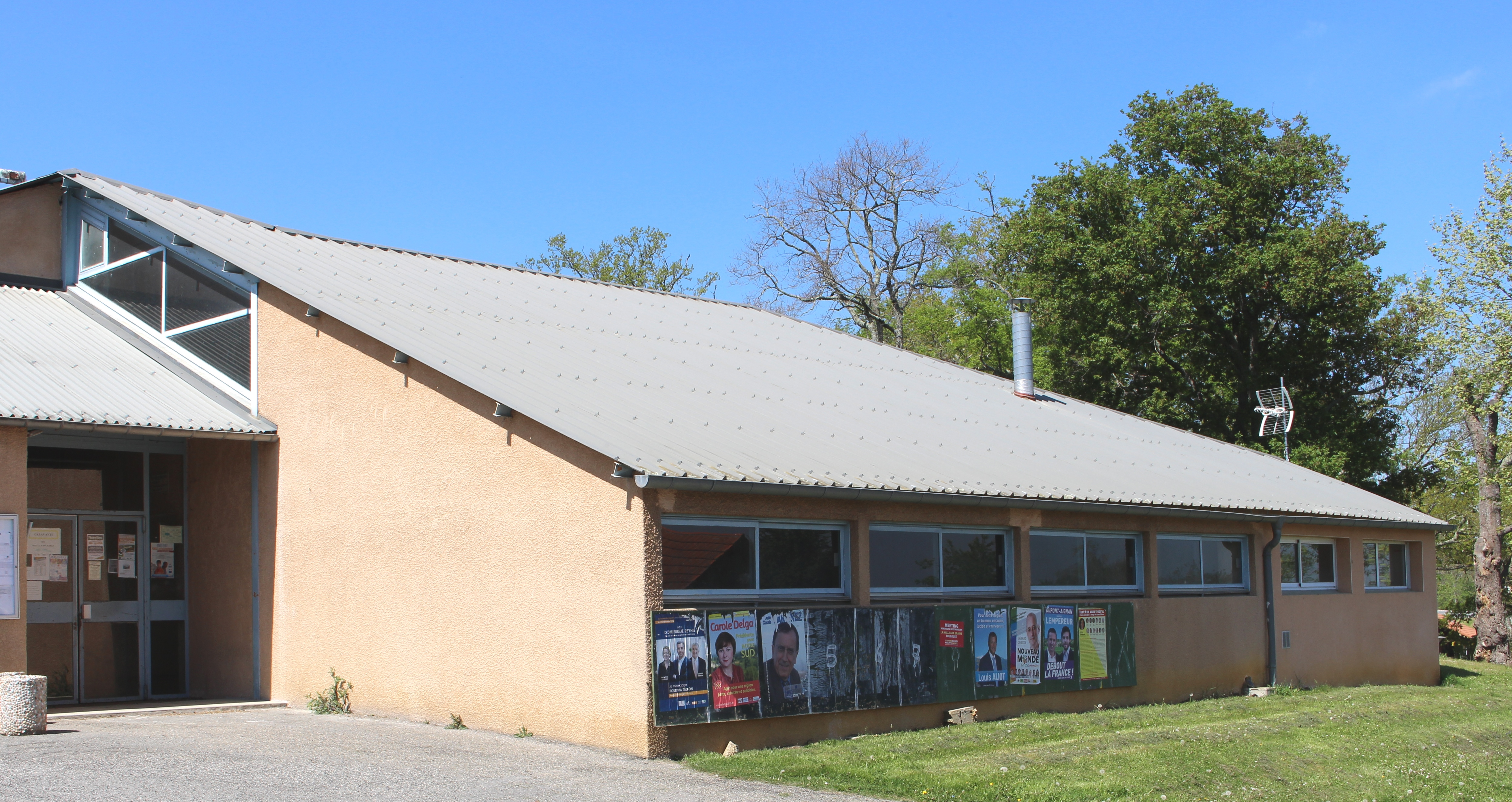 Salle des fêtes de Calavanté (Hautes-Pyrénées)